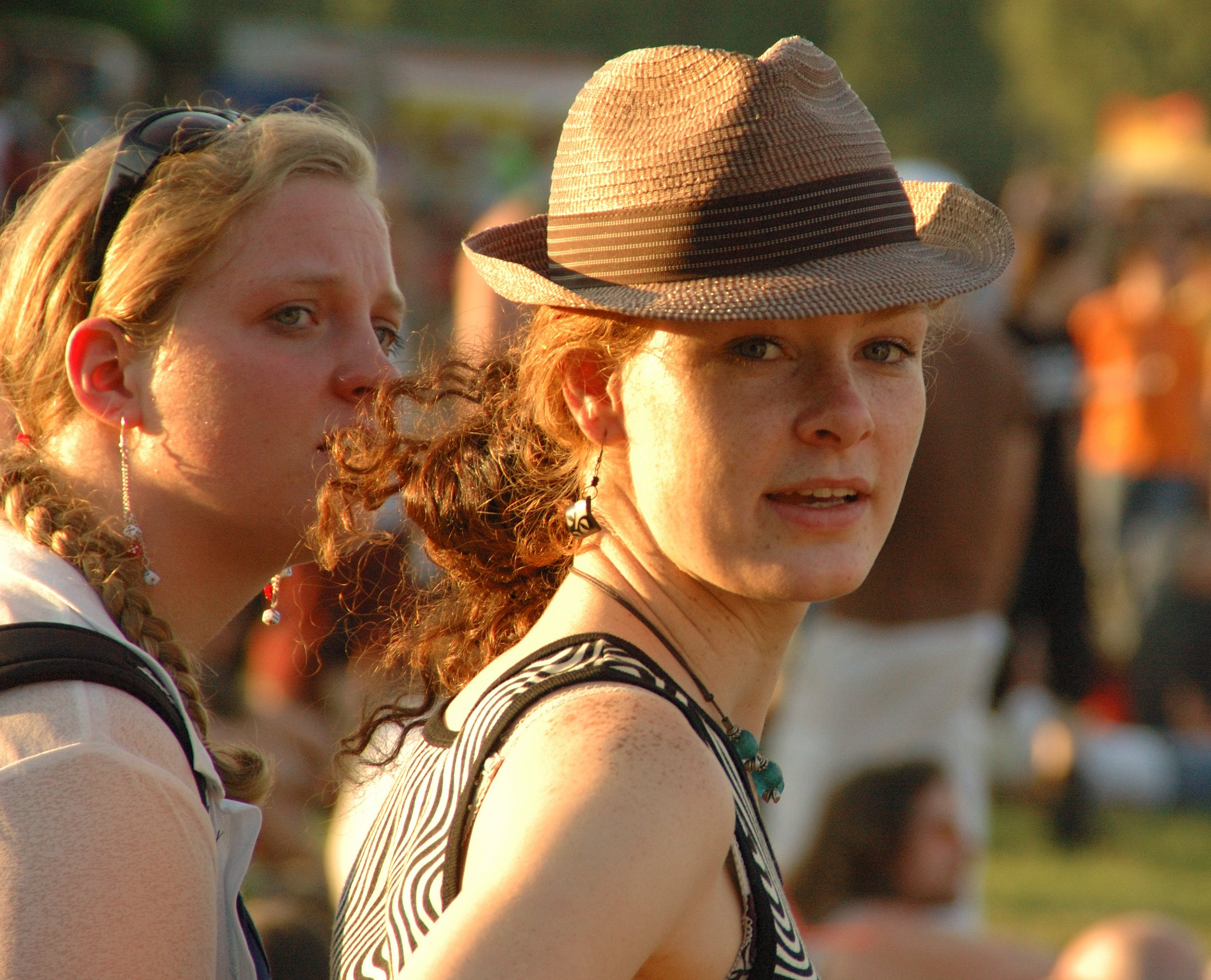 girl with hat at Rheinkultur, Rheinauen, Bonn